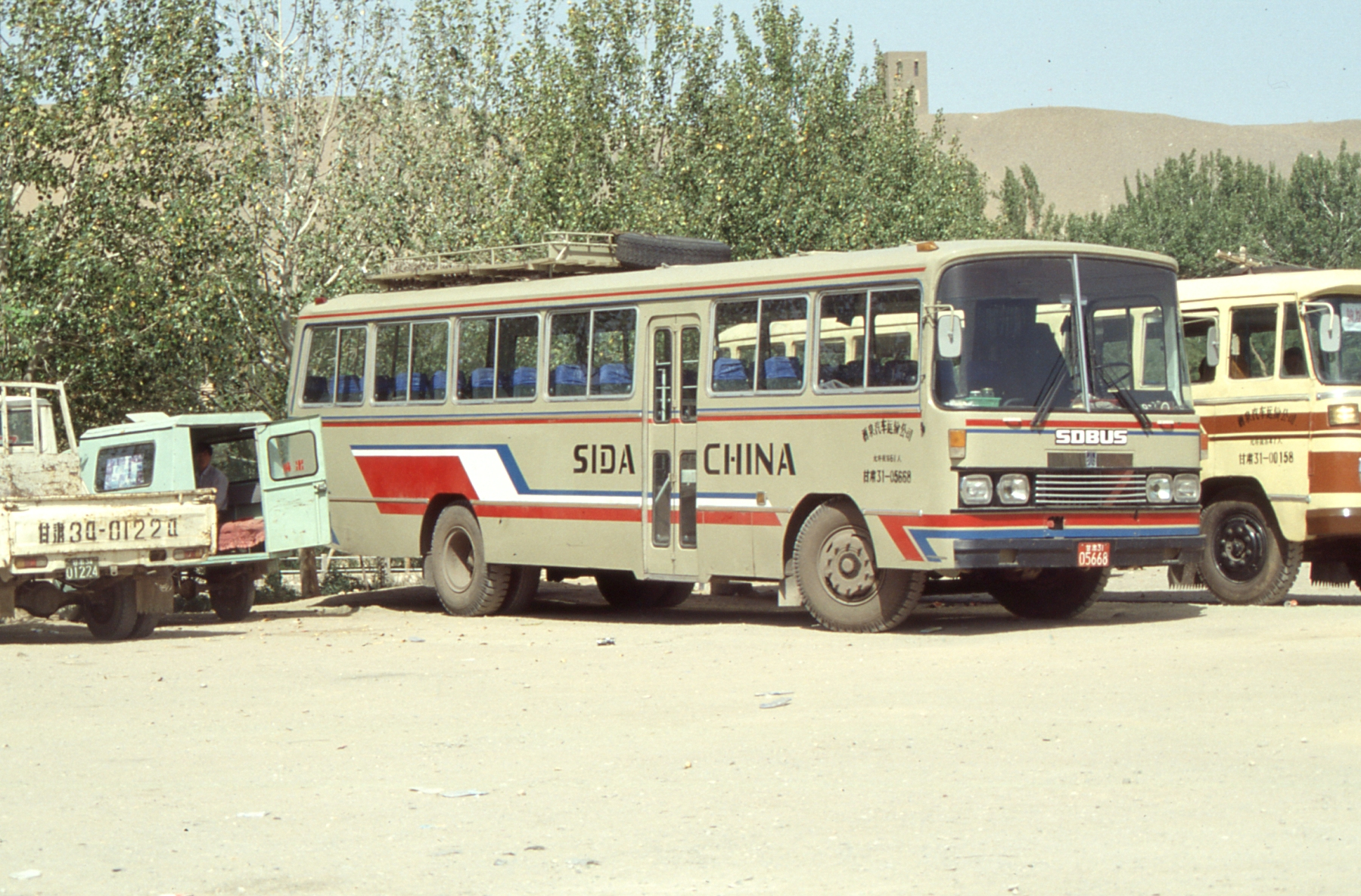 Silk Road 1992